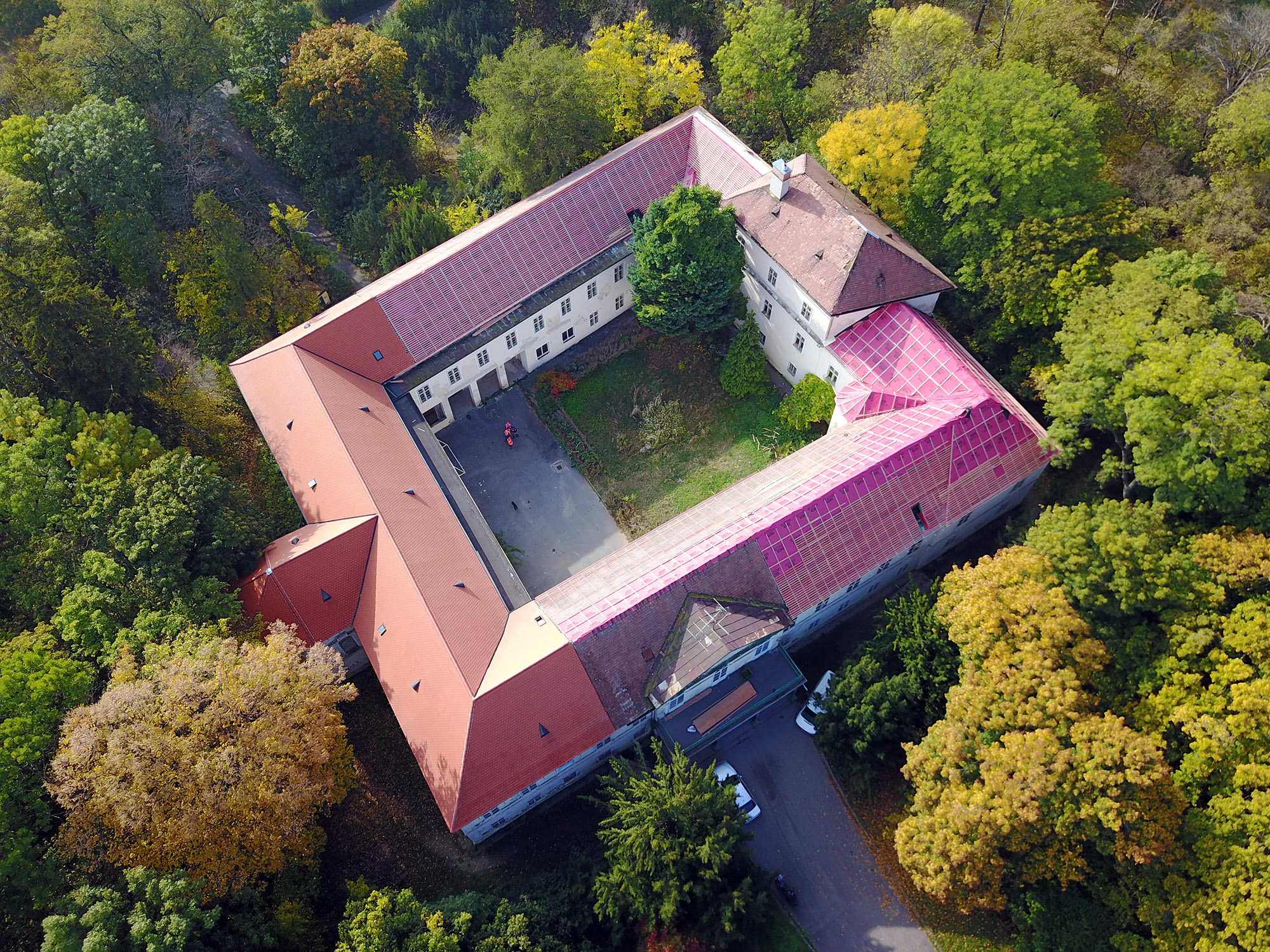 DCIM\100MEDIA\DJI_0136.JPG